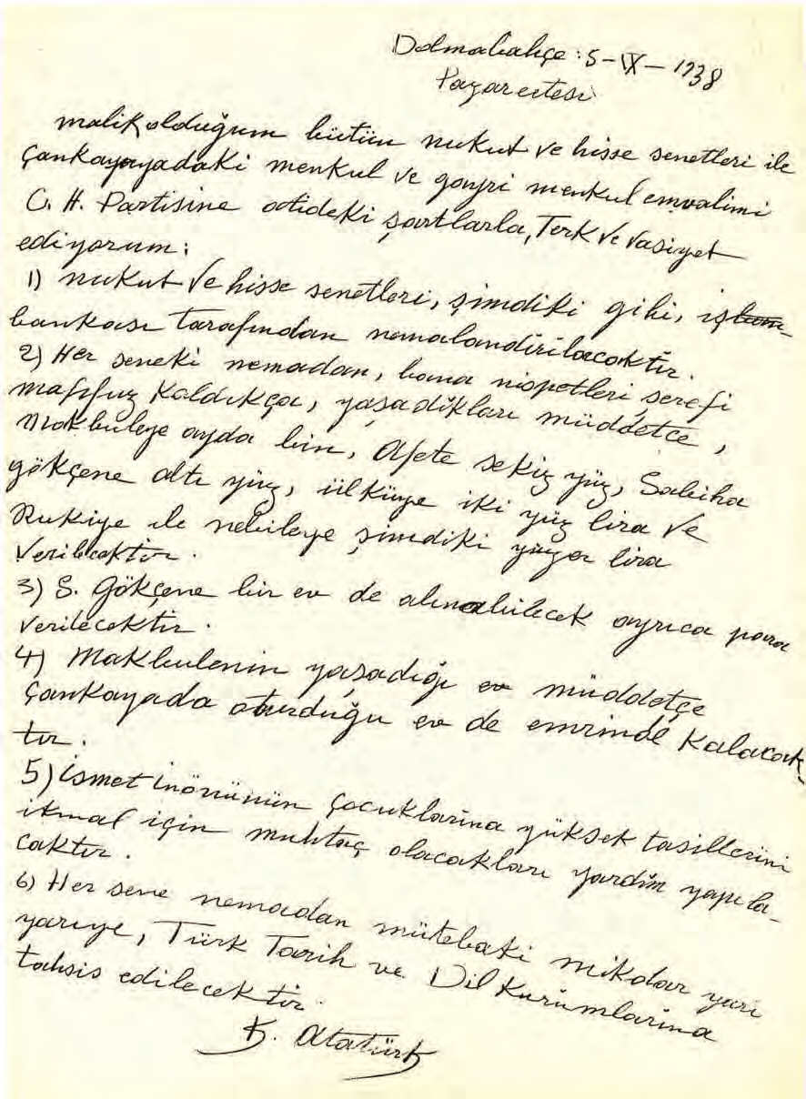 Mustafa Kemal Atatürk'ün 5 Eylül 1938 günü kaleme aldığı vasiyetnamesi.